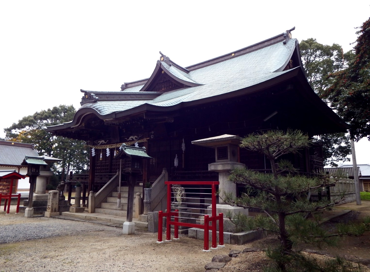 熊手八幡社